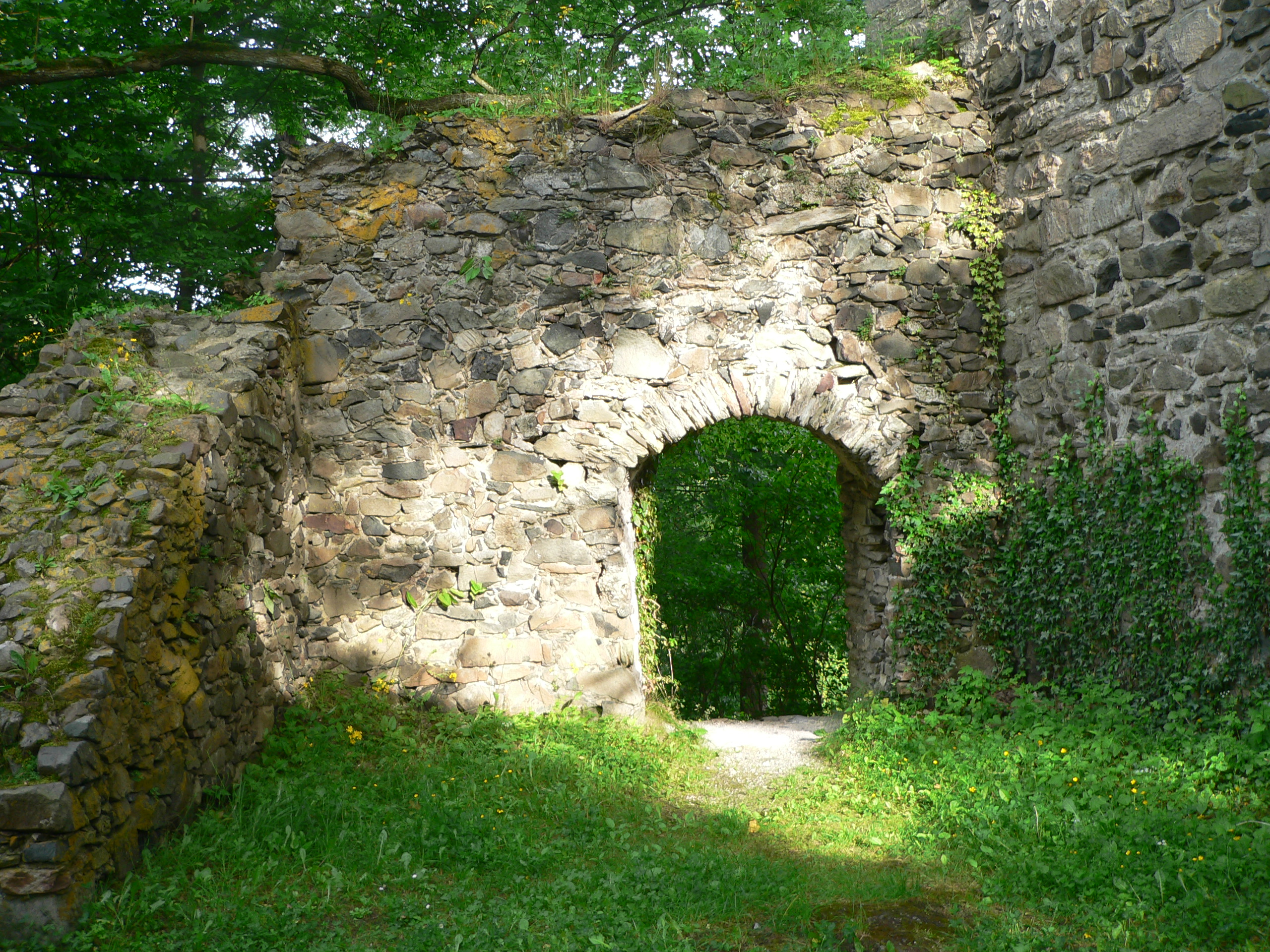 Inneres Burgtor (NO-Seite) des Alten Schlosses in Bad Berneck.